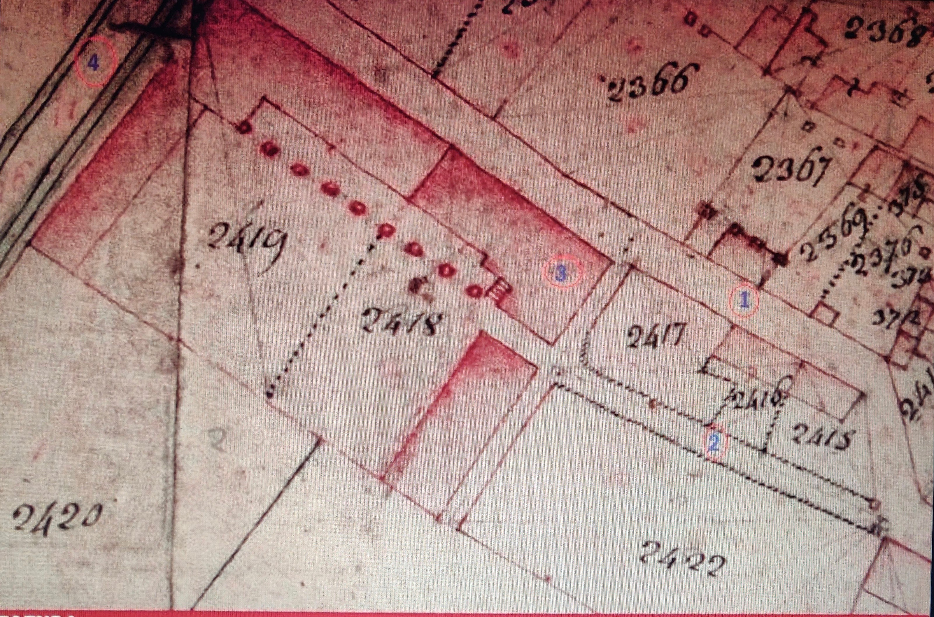 Catasto Napoleonico del 1807, con in rosso evidenziata la villa e la sua posizione rispetto a Via Palazzo